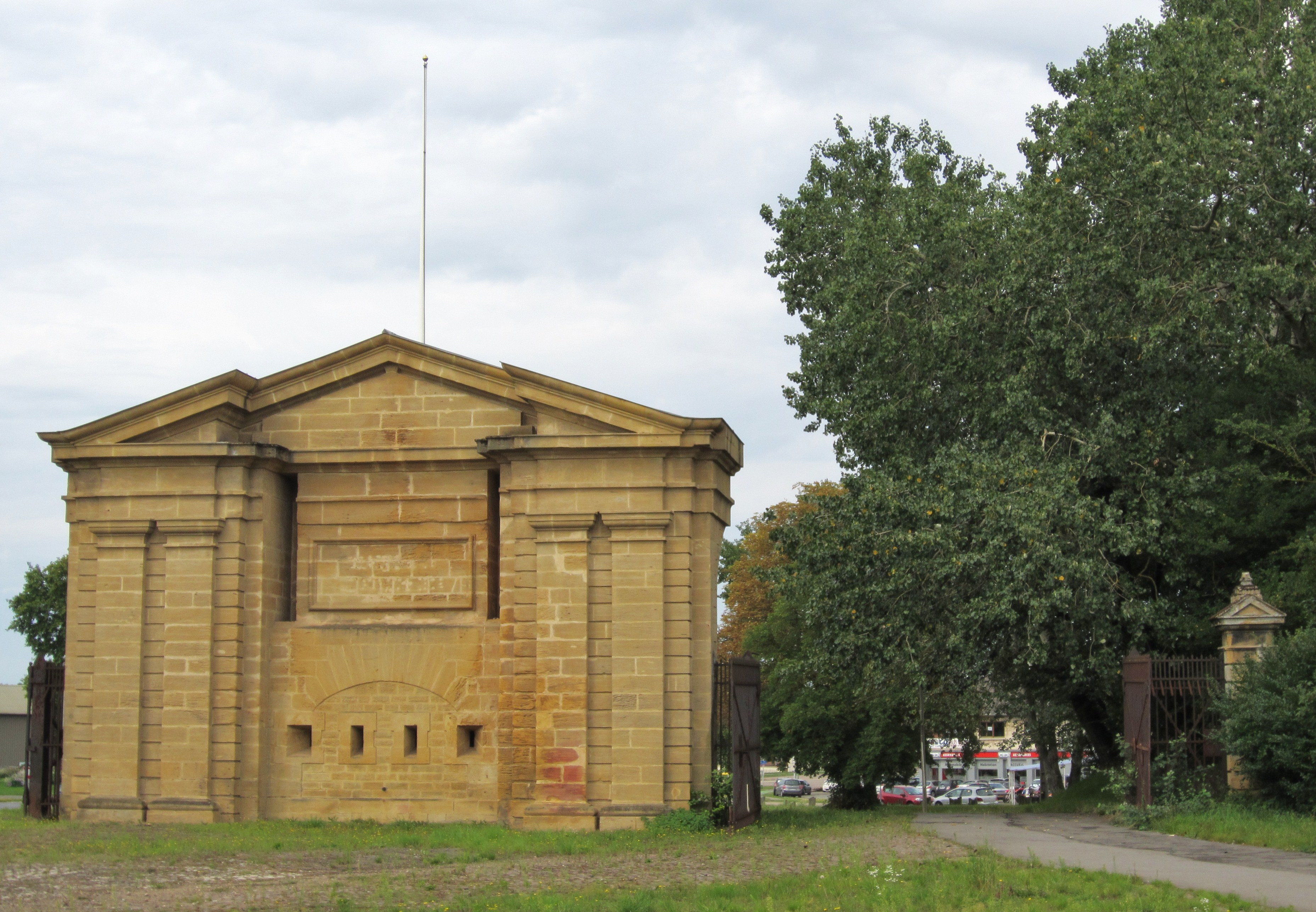 Description porte de sarrelouis Thionville (vier [1]) Date26 August 2011Sourcemon appareil photoAuthorAimelaimePermission (Reusing this file) porte de sarrelouis Thionville (vier [1])